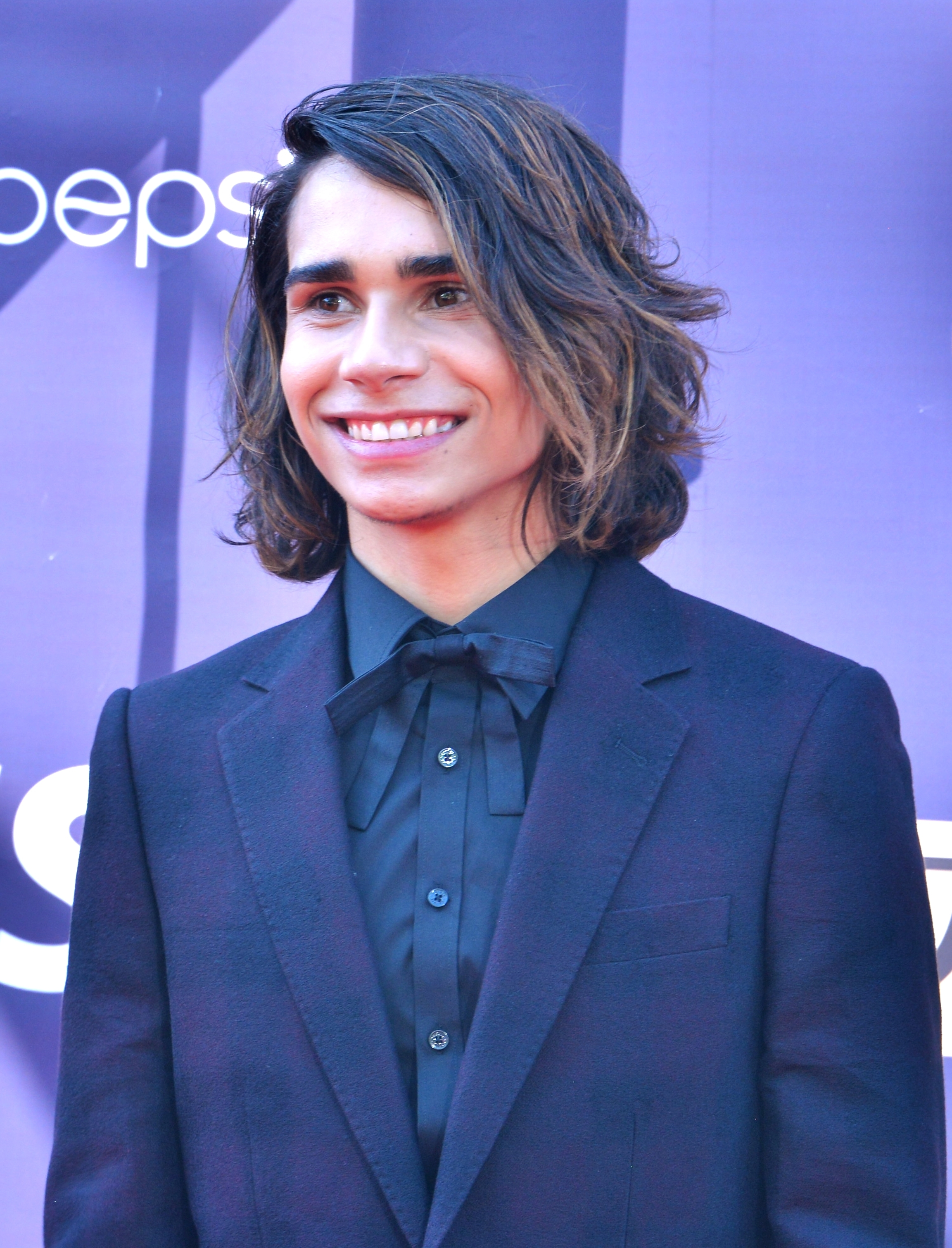 Австралійський співак Ісая на церемонії відкриття Євробачення 2017 у Києві